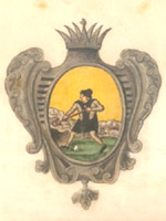 Томск, герб (1730)